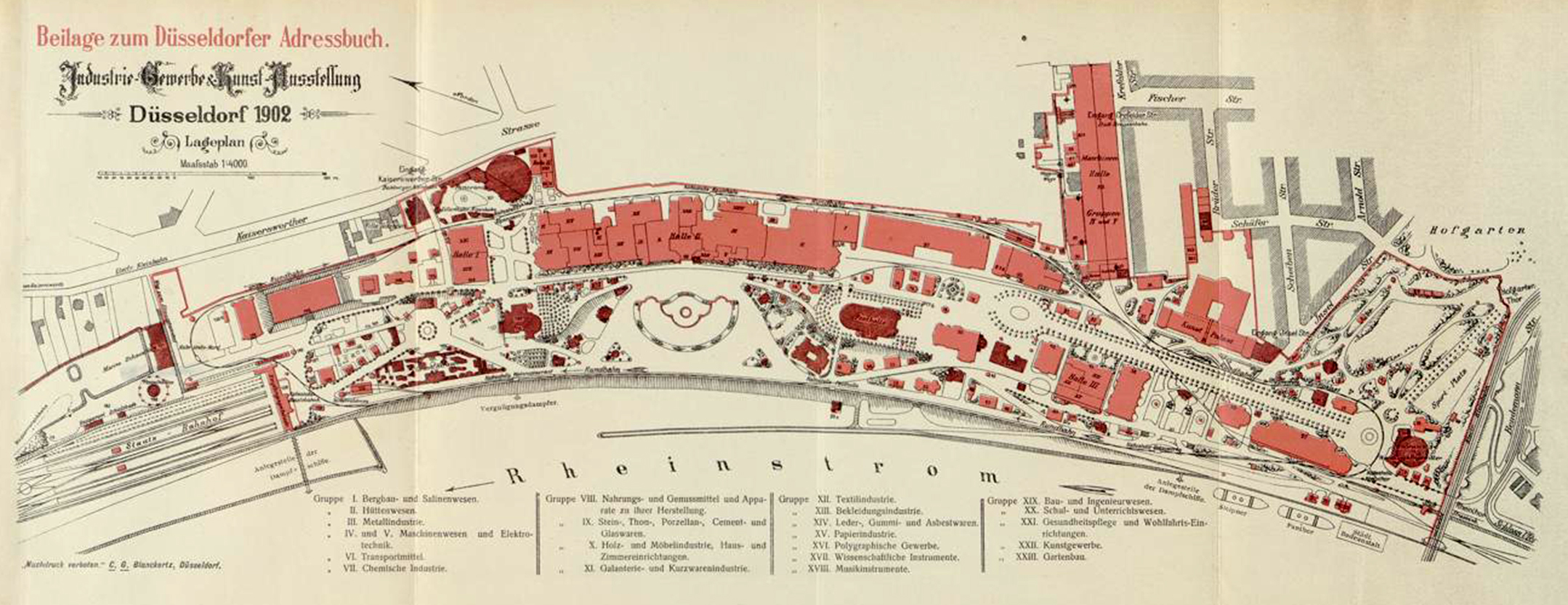 Industrie-Gewerbe & Kunst-Ausstellung, Lageplan, Düsseldorf 1902